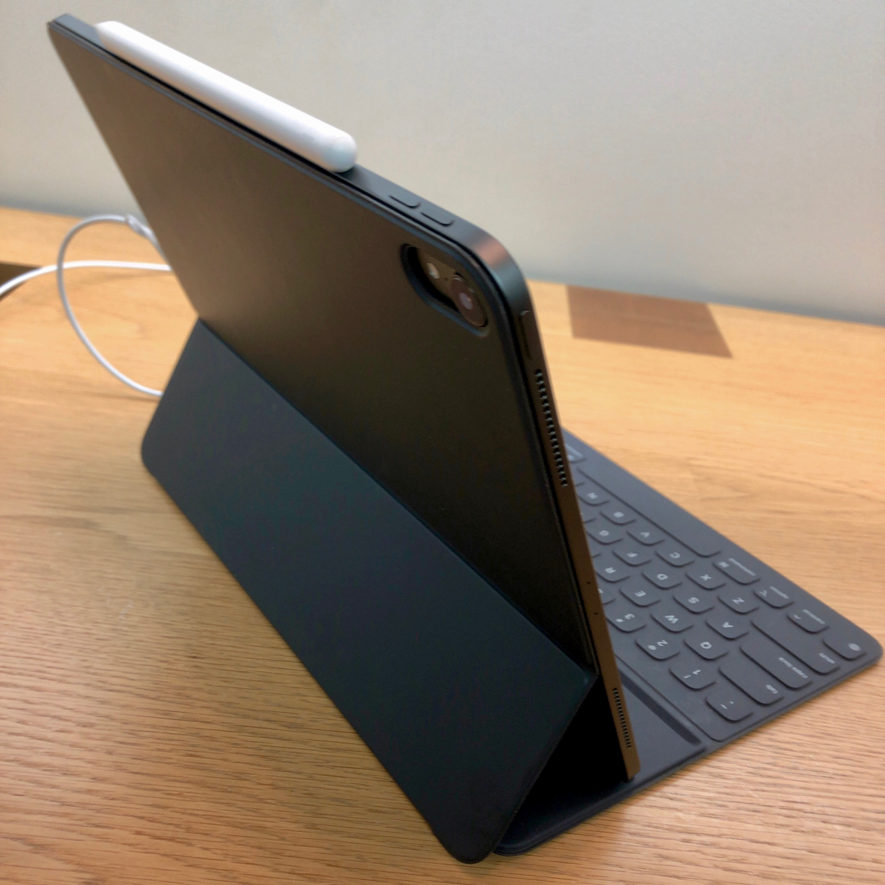 iPad Pro 12.9インチ（2018年モデル）Smart Keyboard Folio 装着時（背面）。